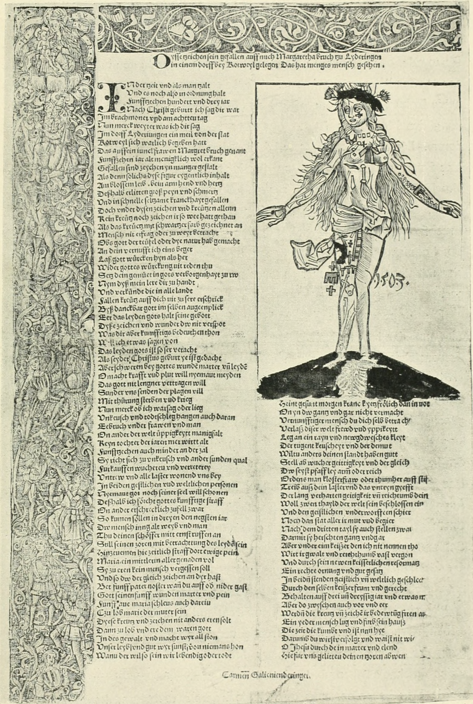 Wunderzeichen an Margaretha Bruch zu Leidringen 1503. In: Wunder, Wundergeburt und Wundergestalt in Einblattdrucken des fünfzehnten bis achtzehnten Jahrhunderts; kulturhistorische Studie (1921), S. 220